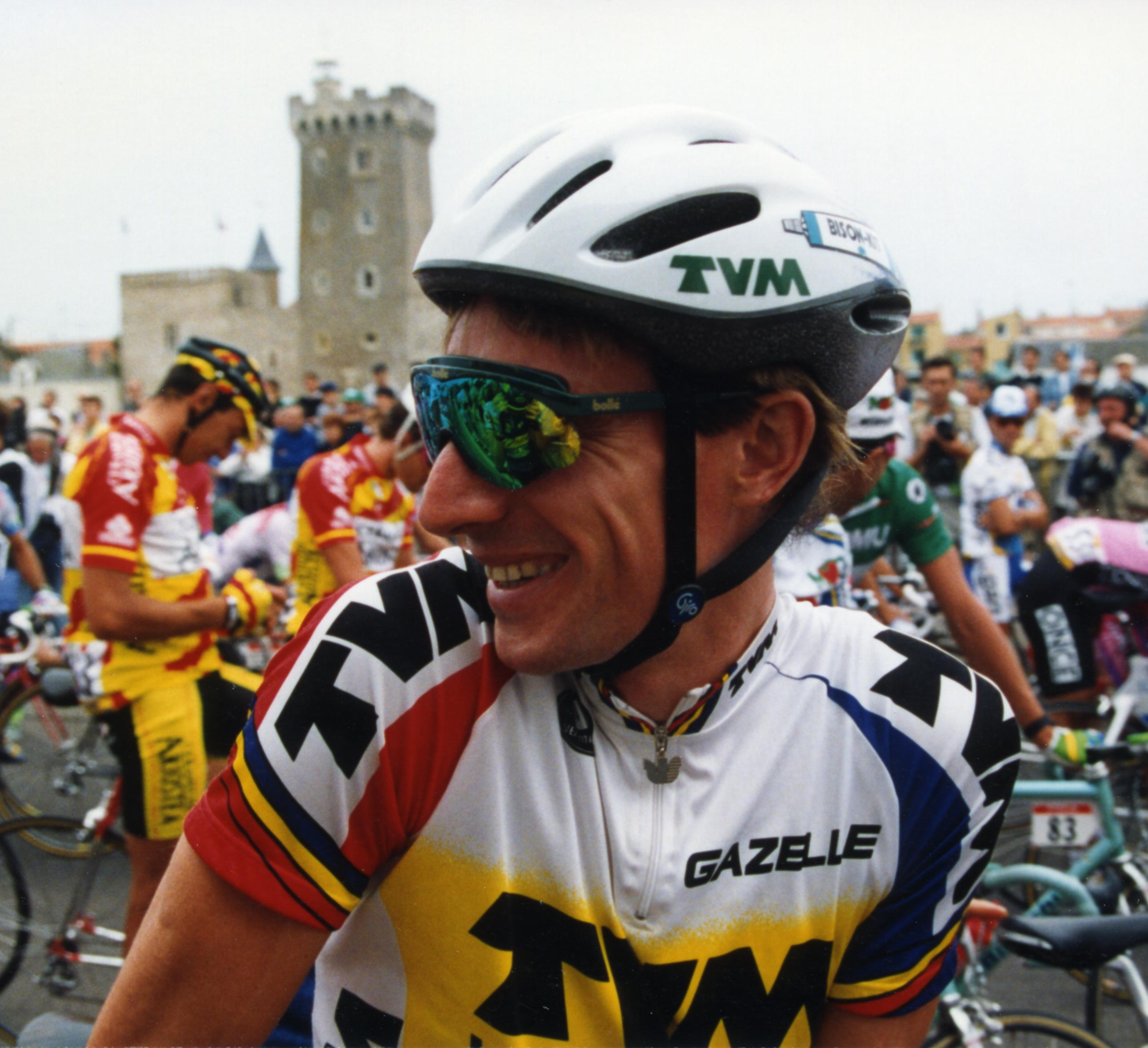 TOURS DE FRANCE 1993